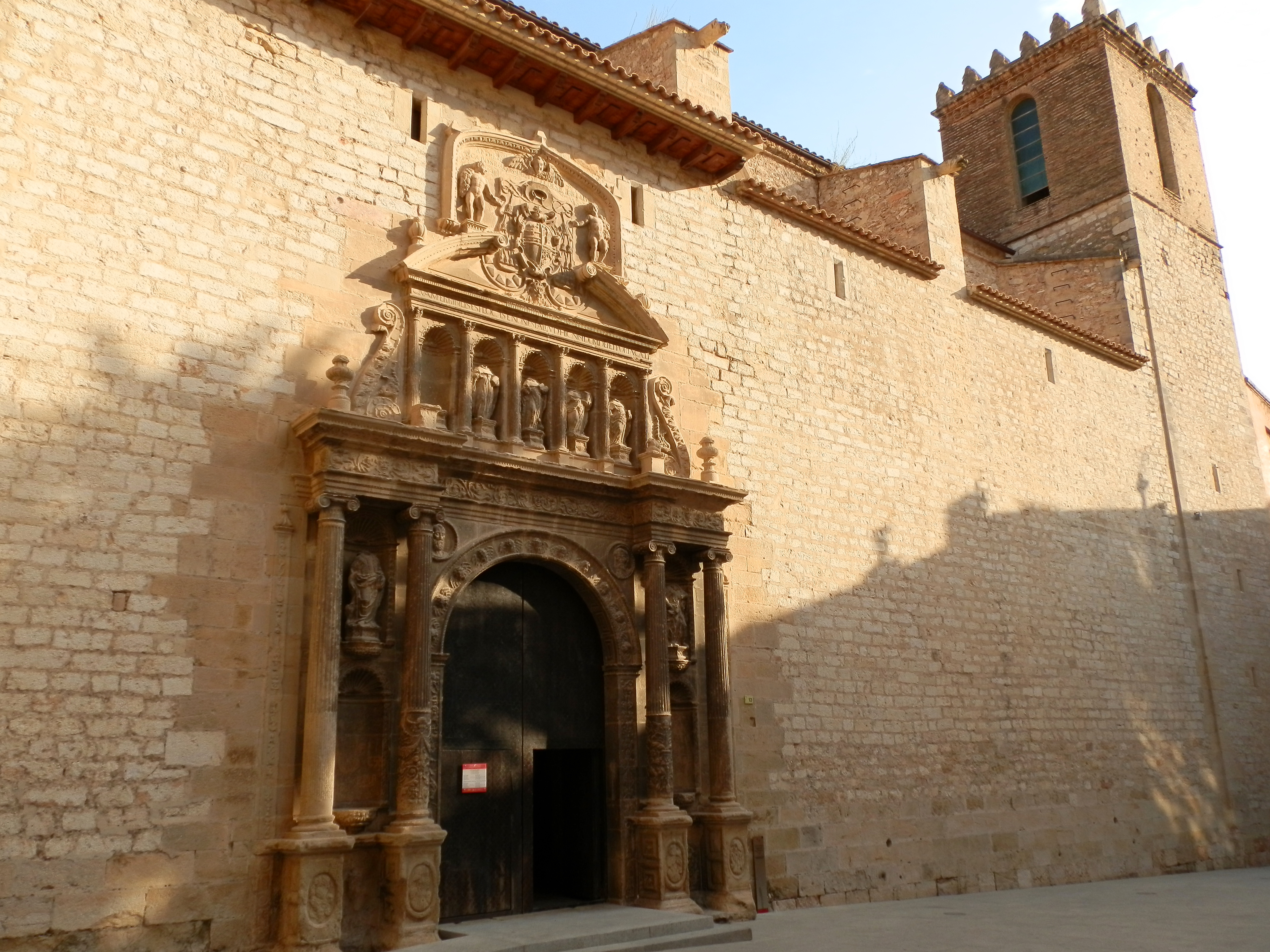 Fachada renacentista de la iglesia de Santo Domingo (1585). En la parte superior de la puerta hay cinco hornacinas donde deberían figurar cinco figuras, pero solo quedan cuatro y están decapitadas. El conjunto está coronado por las armas del Obispo Izquierdo.